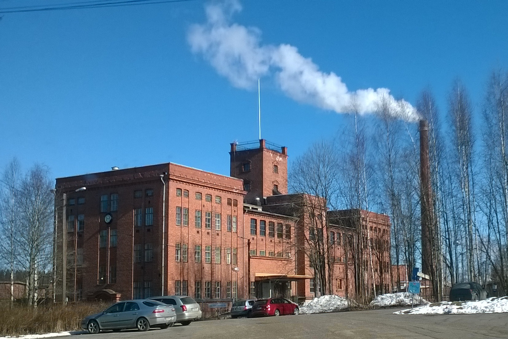 Tervakosken paperitehdas ja yhdyskunta; historiallinen teollisuusympäristö Janakkalassa